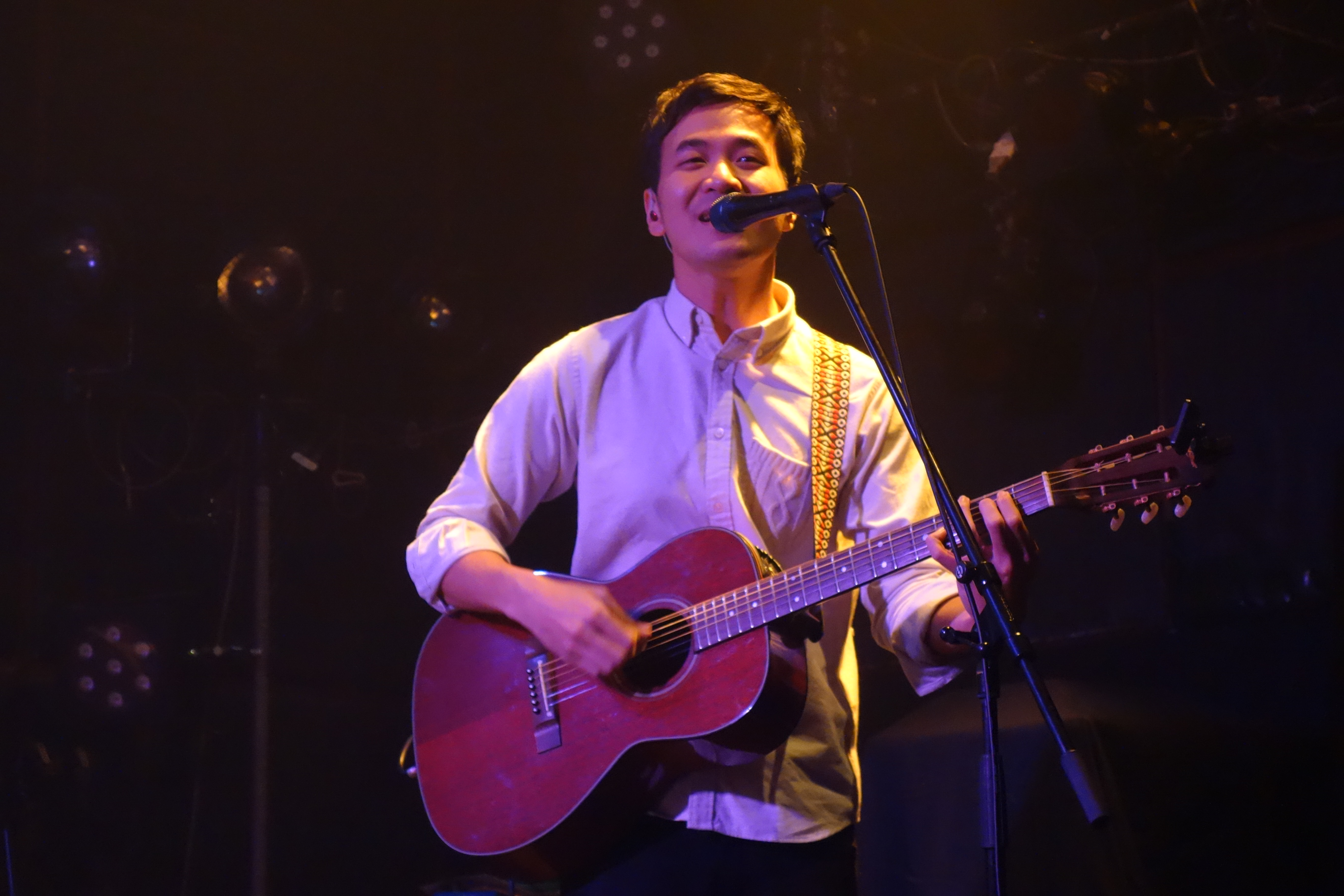 タイのシンガーソングライター、スタンプ・アピワットの来日ライブの写真です。 2017年10月17日 青山 月見ル君想フ ライブにて。